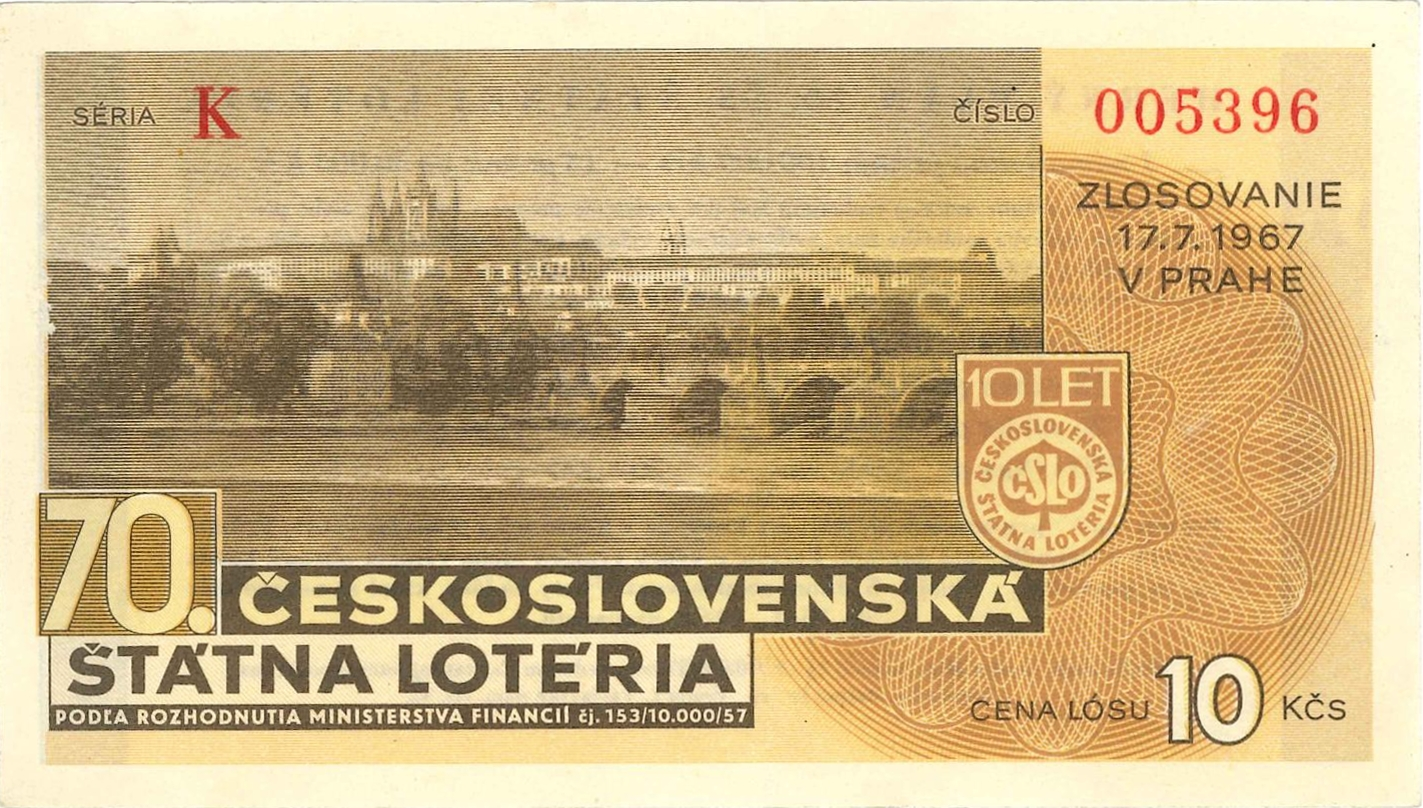 vývoj losů ČSLO